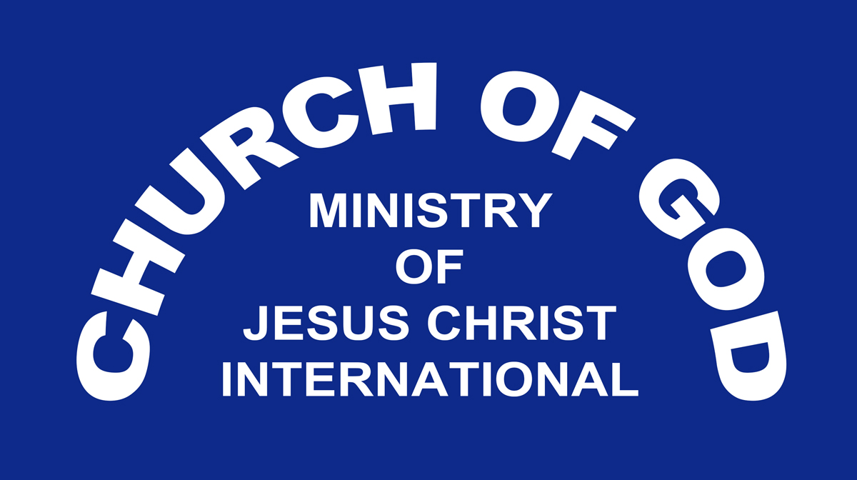 This is the english language logo of the Church Of God Ministry of Jesus Christ International